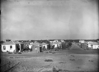 גבעתיים - שכונת בורוכוב - פנורמה.